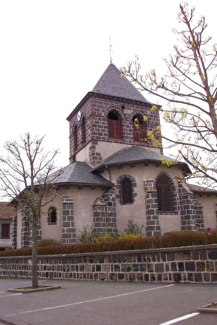 Église Saint-Ours les Roches (Puy-de-Dôme) (photo personnel 2004)